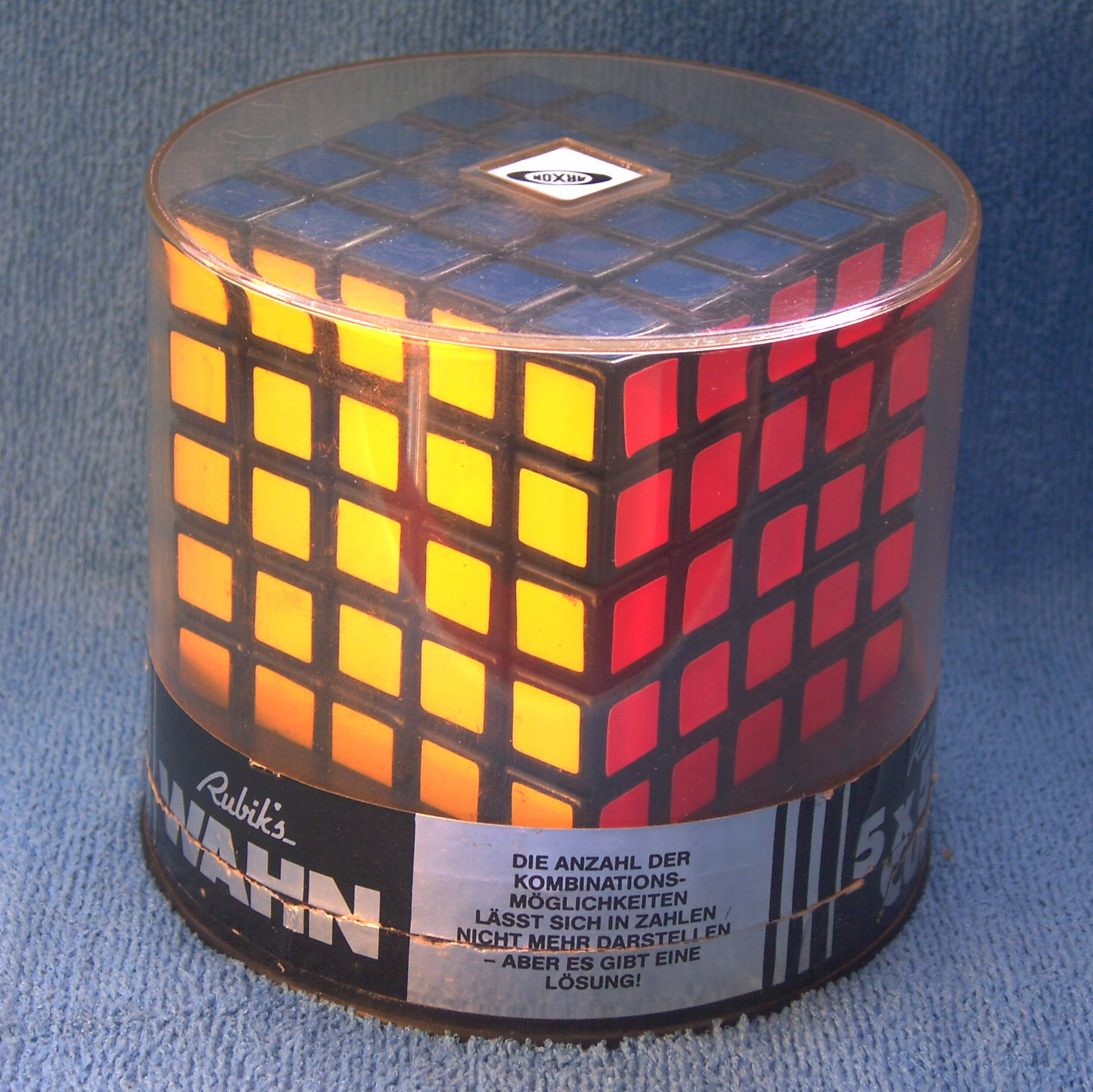 Rubik's Wahn (Rubik's 5x5x5 Cube) orig. Arxon in Originalverpackung, 1986 (DM 36,90)